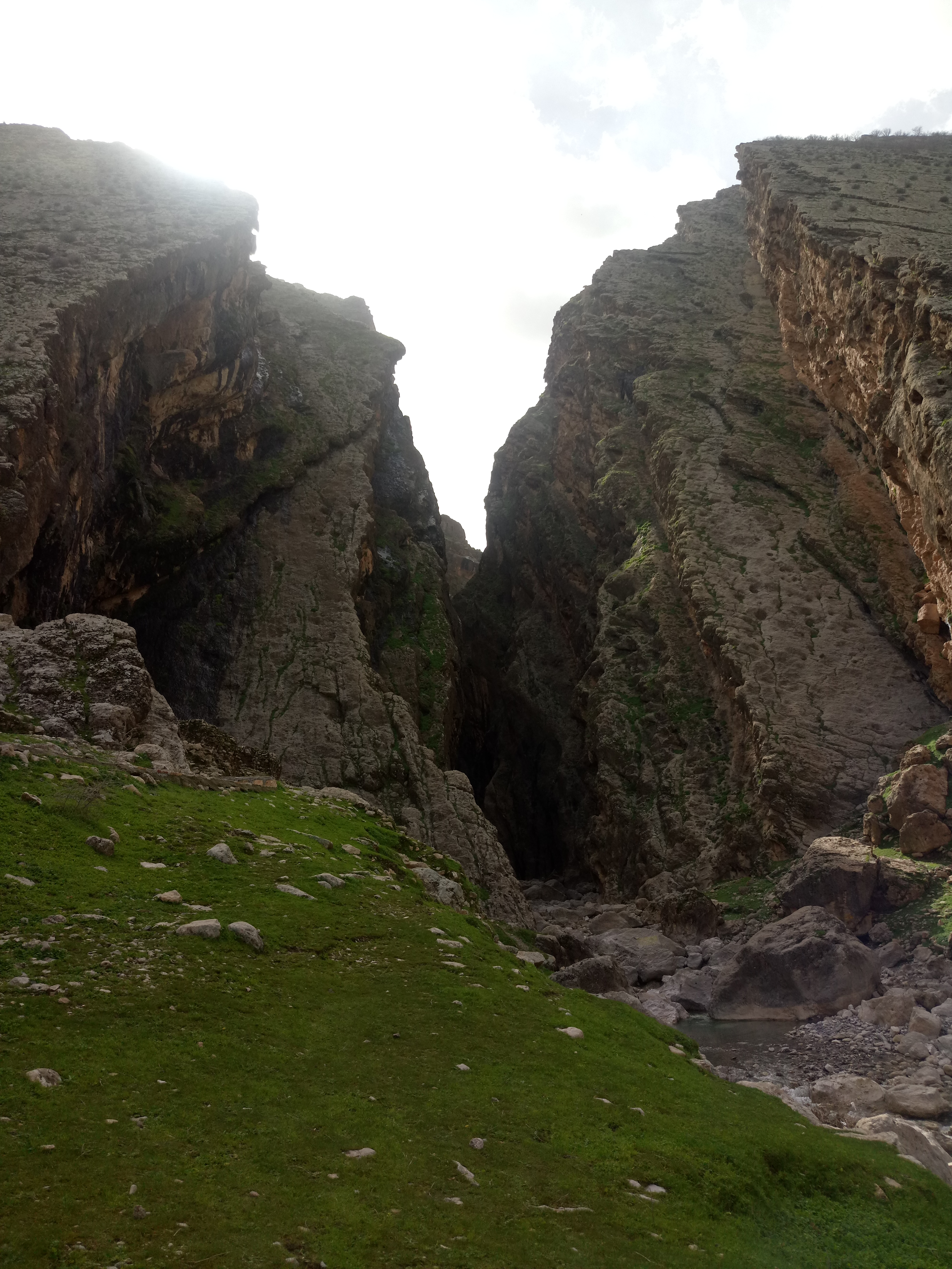 تنگه بهرام چوبین